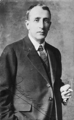 General Jorge Ubico, vestido de civil, en los primeros años de su presidencia. Guatemala, ca. 1930.